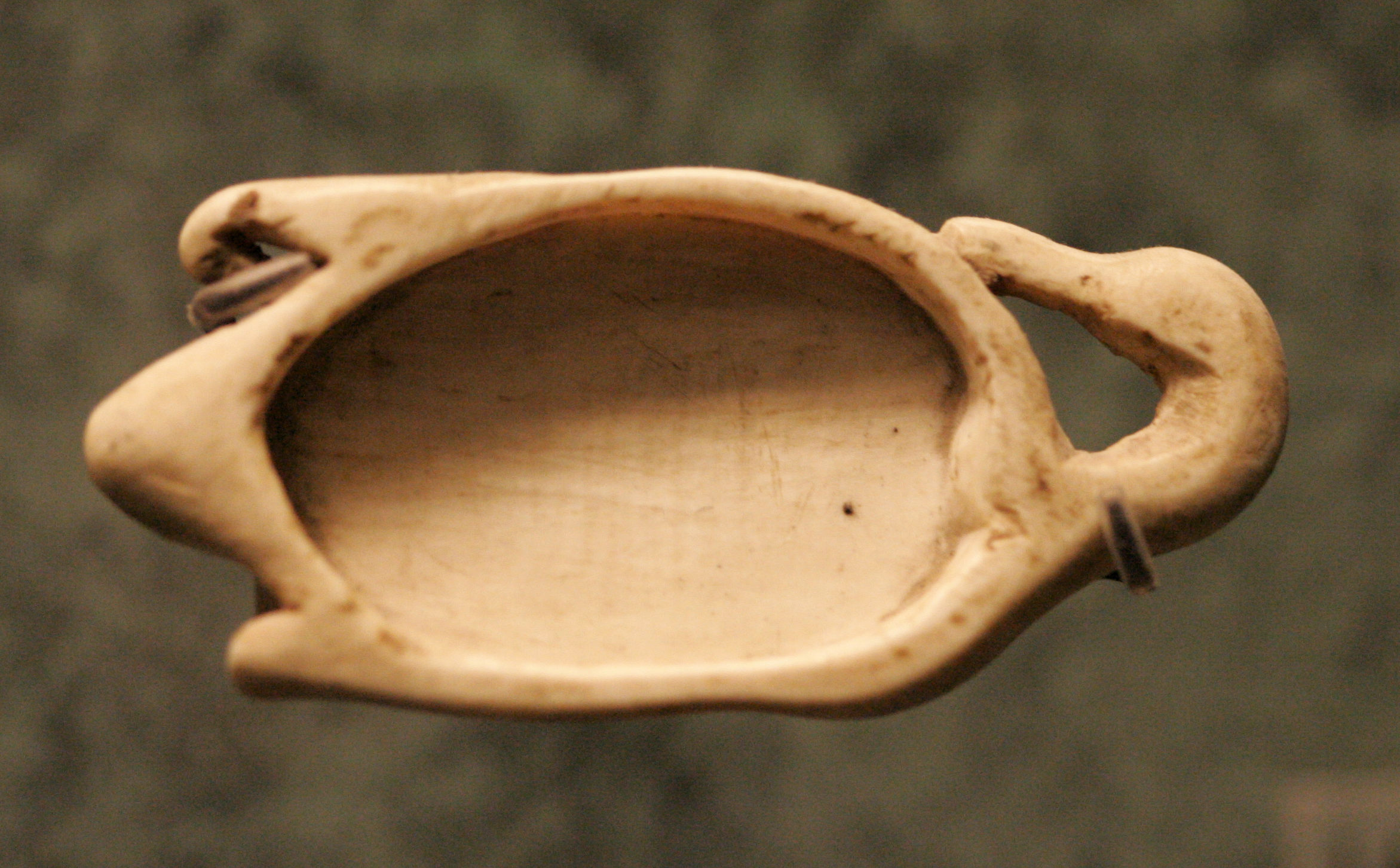 Artist Unknown artistDescription Goose-shaped kohl spoon IvoryDimensions 5.50 cm longCollection Louvre Museum (Inventory)Native nameMusée du LouvreParent institutionÉtablissement public du musée du Louvre LocationParisCoordinates48° 51′ 37.42″ N, 2° 20′ 15.36″ E Established1793 Web page control : Q19675 VIAF: 257711507 ISNI: 0000 0001 2260 177X ULAN: 500125189 LCCN: n80020283 NLA: 35912436 WorldCat institution QS:P195,Q19675Current location Sully Rez-de-chaussée La parure Salle 9Accession number N 1823References Louvre.frSource/Photographer Rama Goose-shaped kohl spoon Ivory